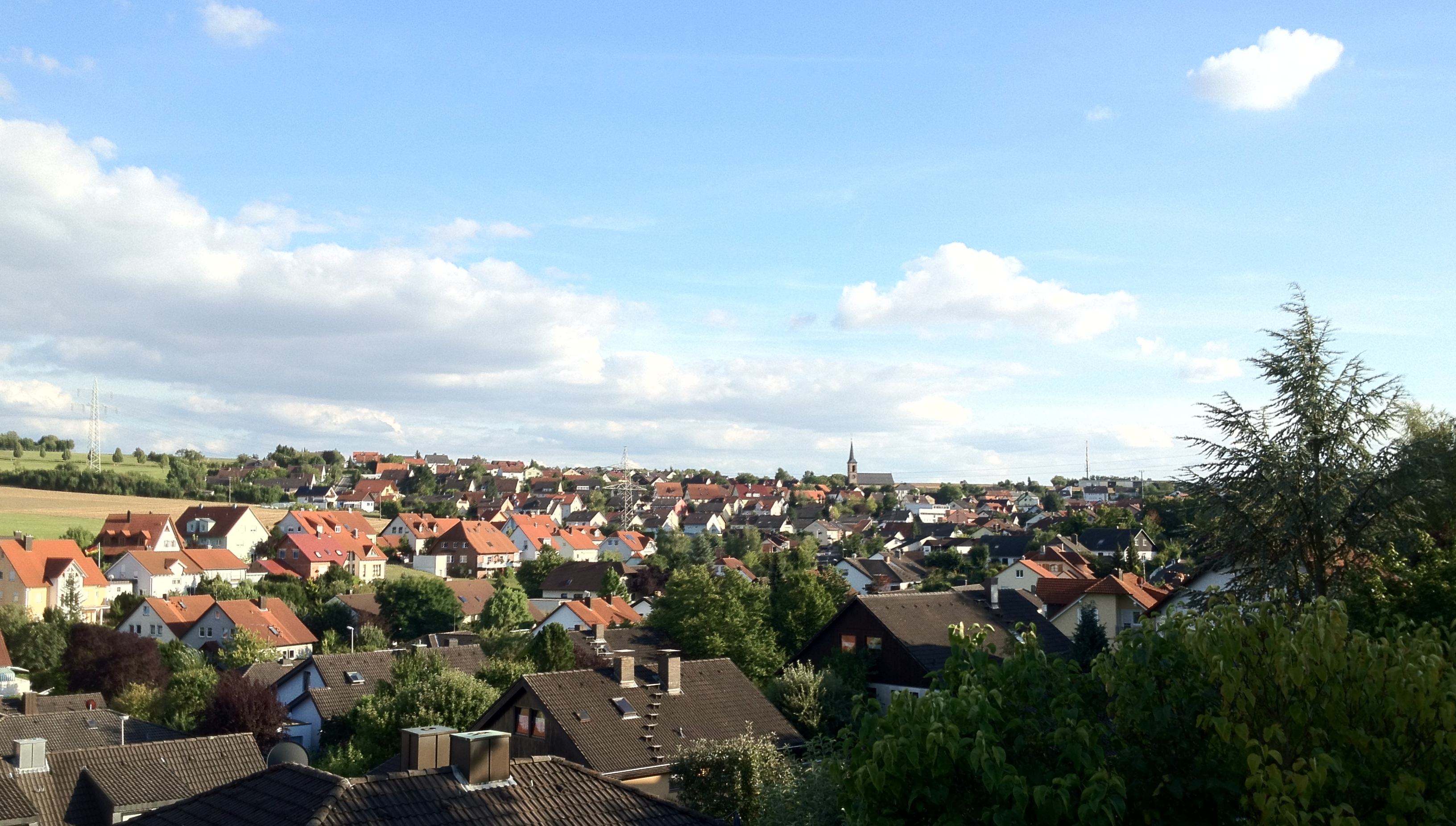 Waldbrunn, Franken, im Landkreis von Würzburg